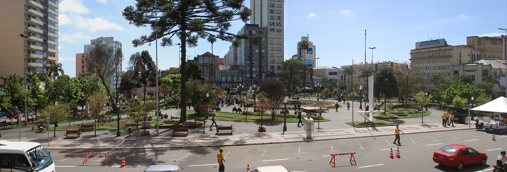 Panorâmica da Praça Dante Alighieri em Caxias do Sul